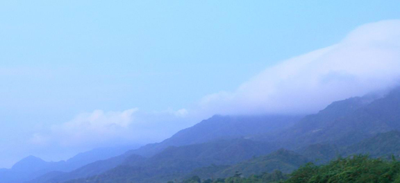 Tagalog: Mga ulap sa itaas ng bundok.